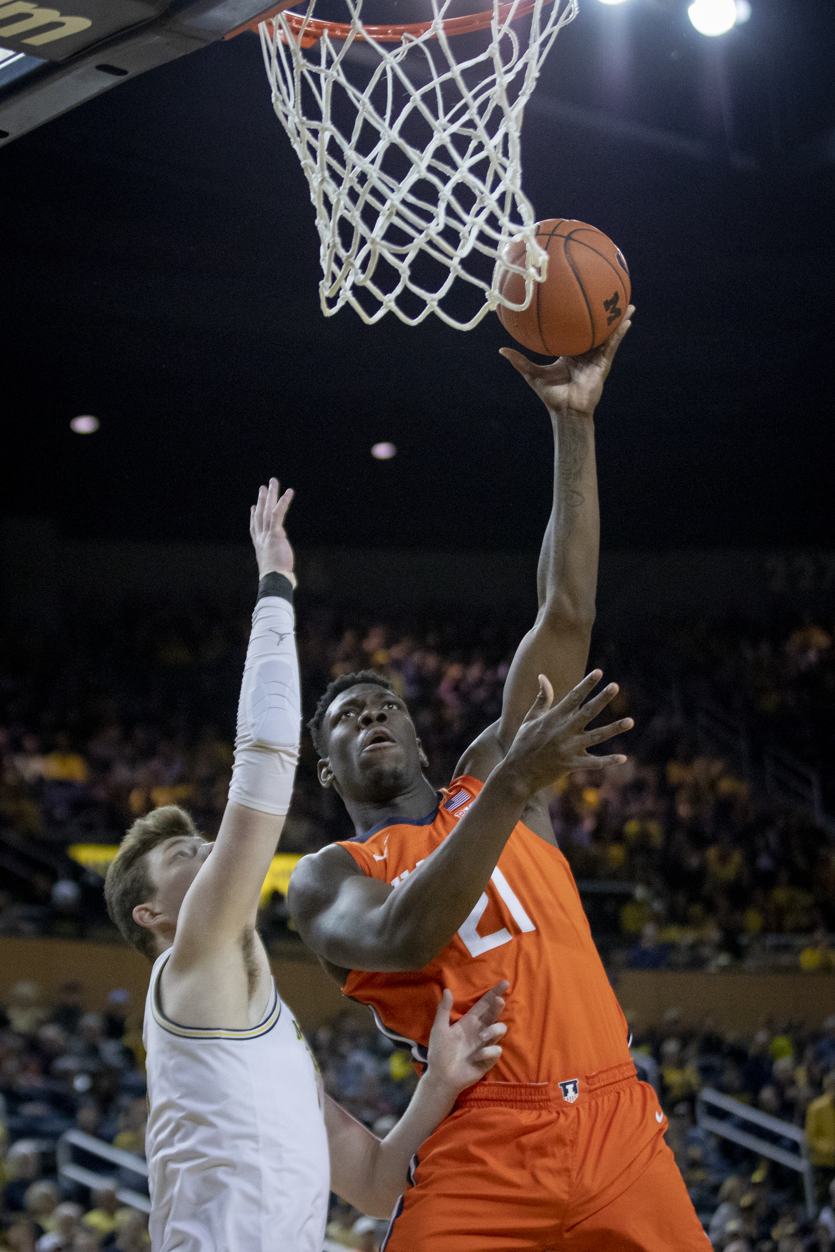 _O6A0707